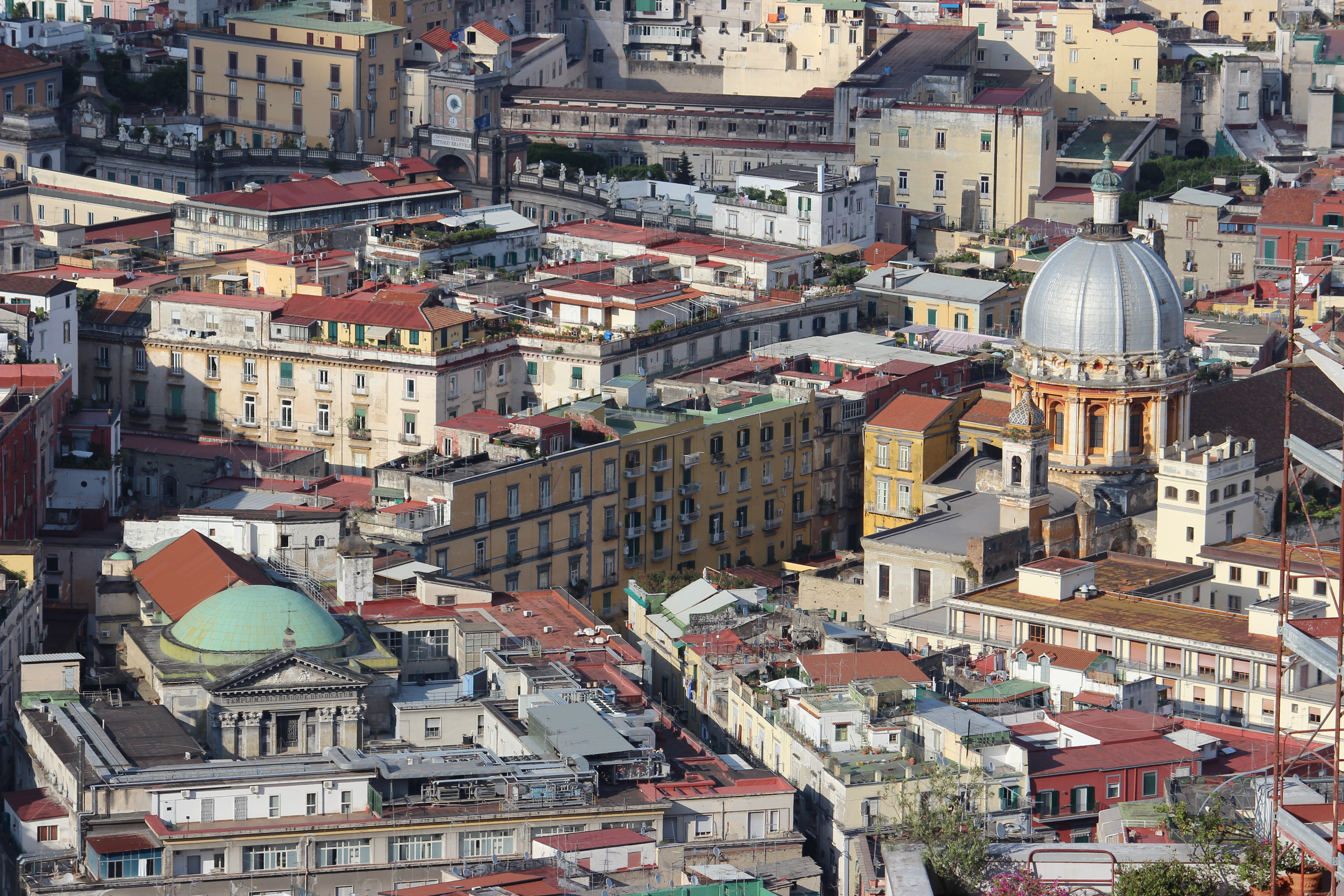 Nápoles, Spirito Santo desde la Certosa di San Martino.